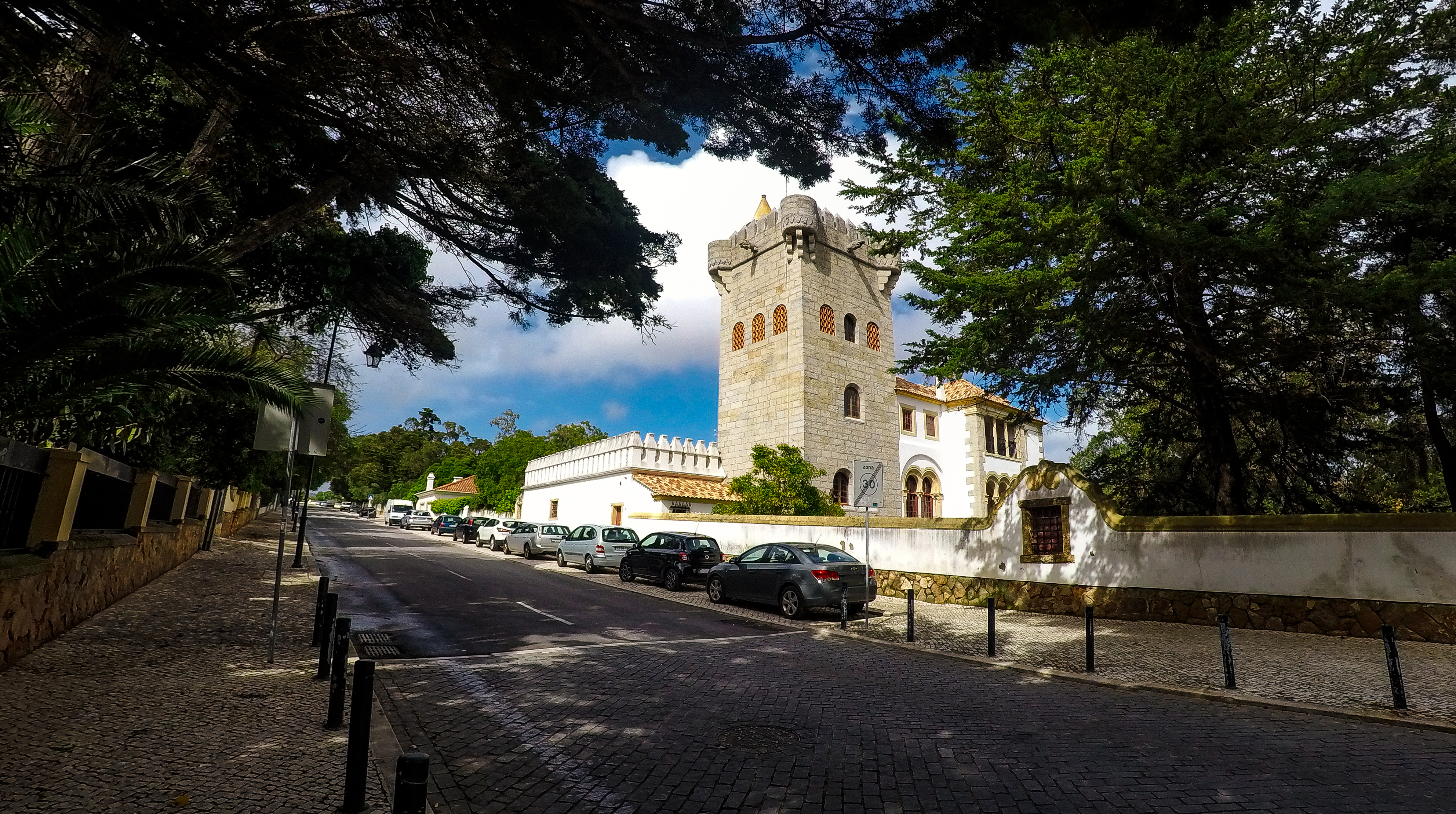 Vista da Torre de São Patrício, no Monte Estoril.